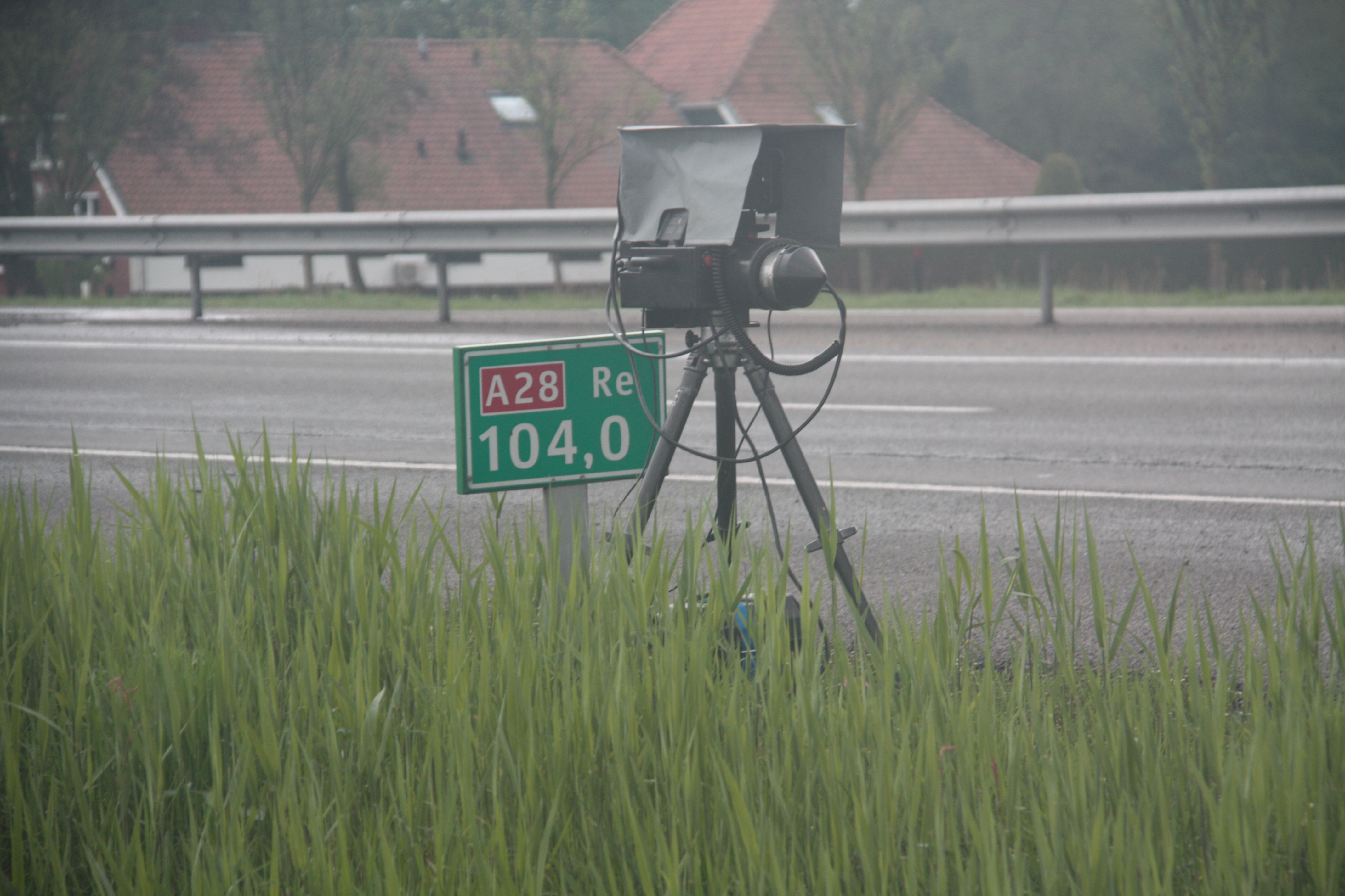 Een flitser langs de A28